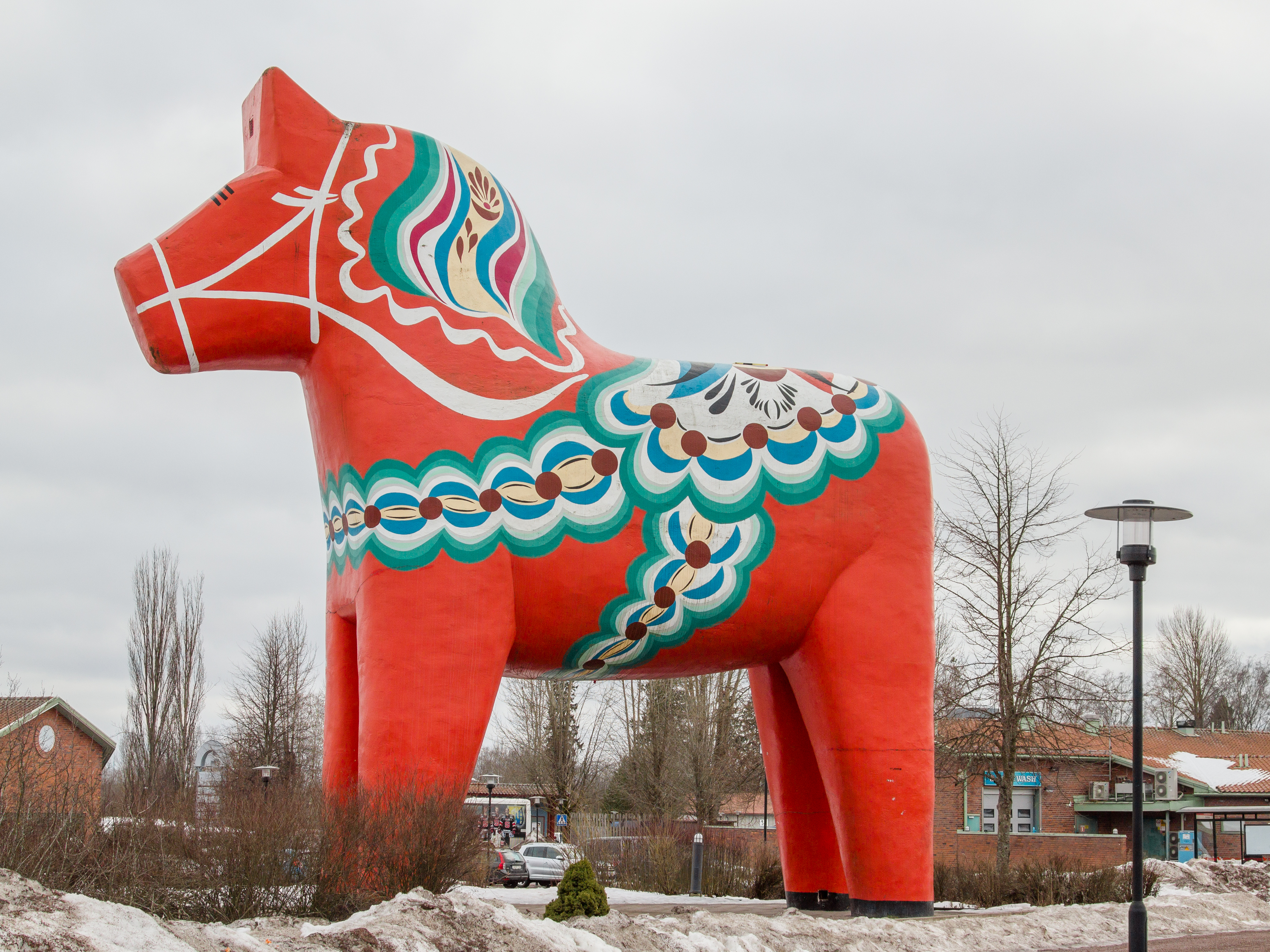 Dalahästen, Avesta, Dalarnas län, Sverige.